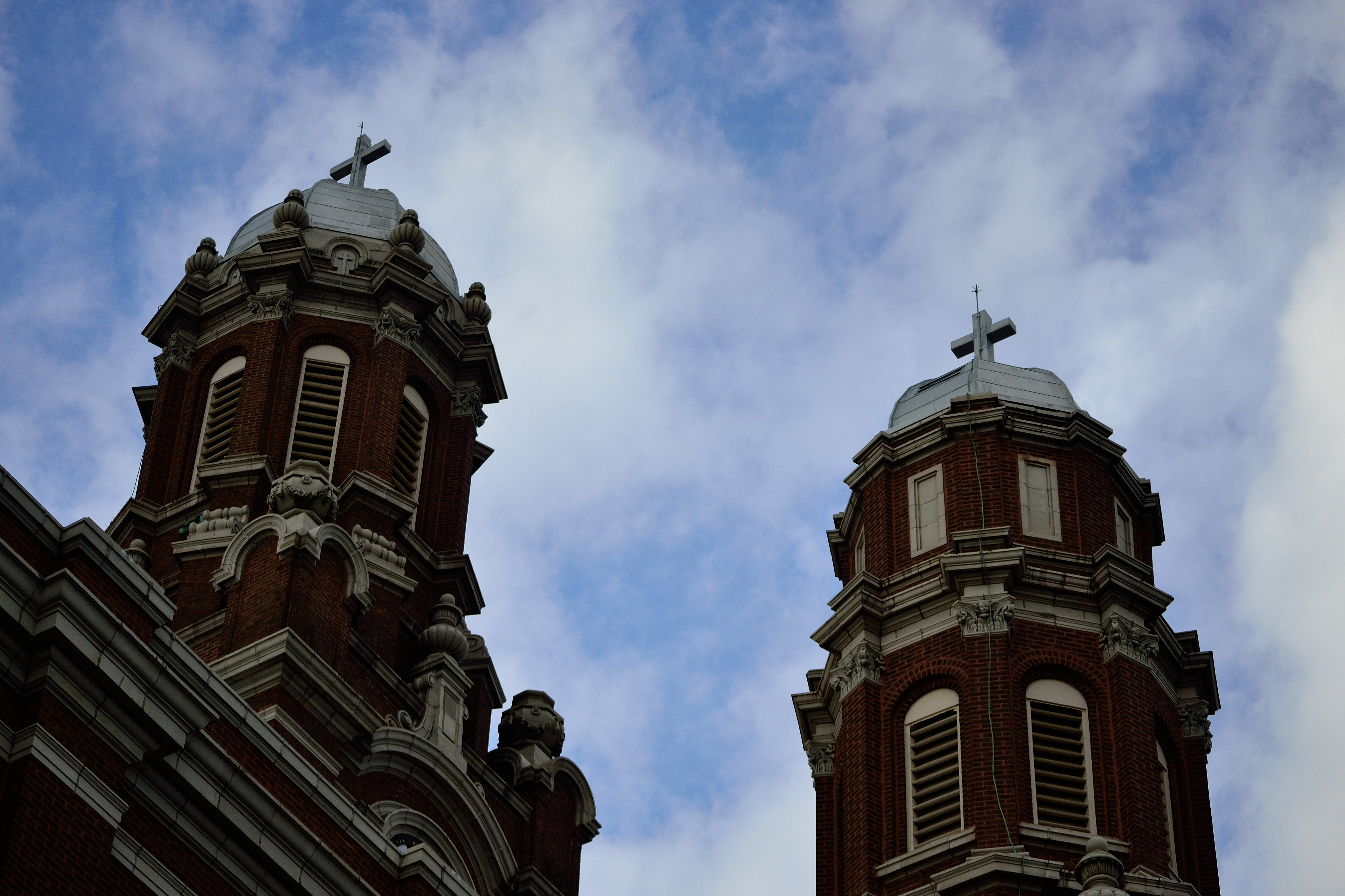 Blue Skies